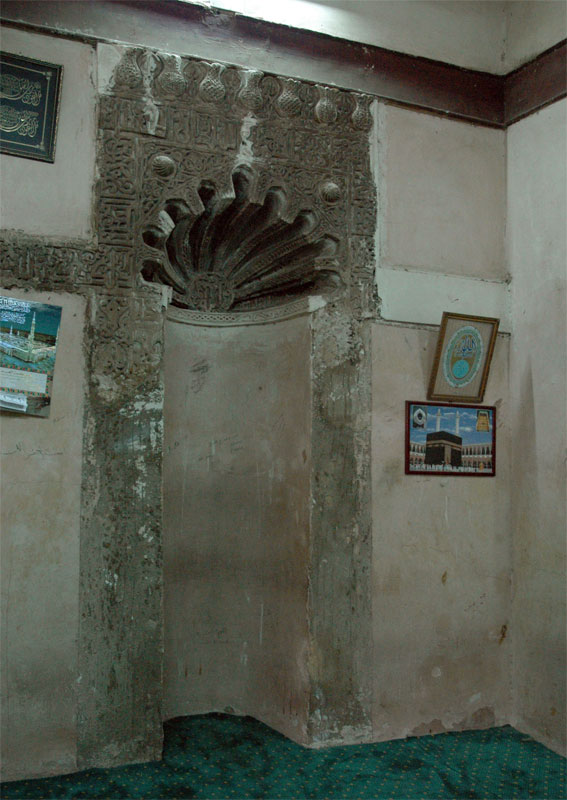 Mashad de Sayyida Ruqayya. Mirhab. El Caire, Egipte